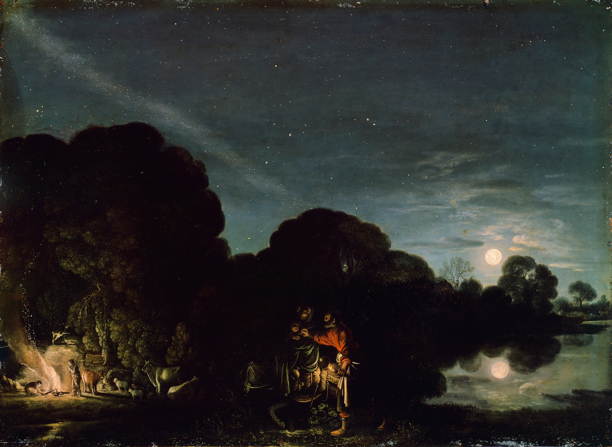 Die Heilige Familie auf der Flucht vor Herodes (Mt. 2,13) zieht durch die Nacht.